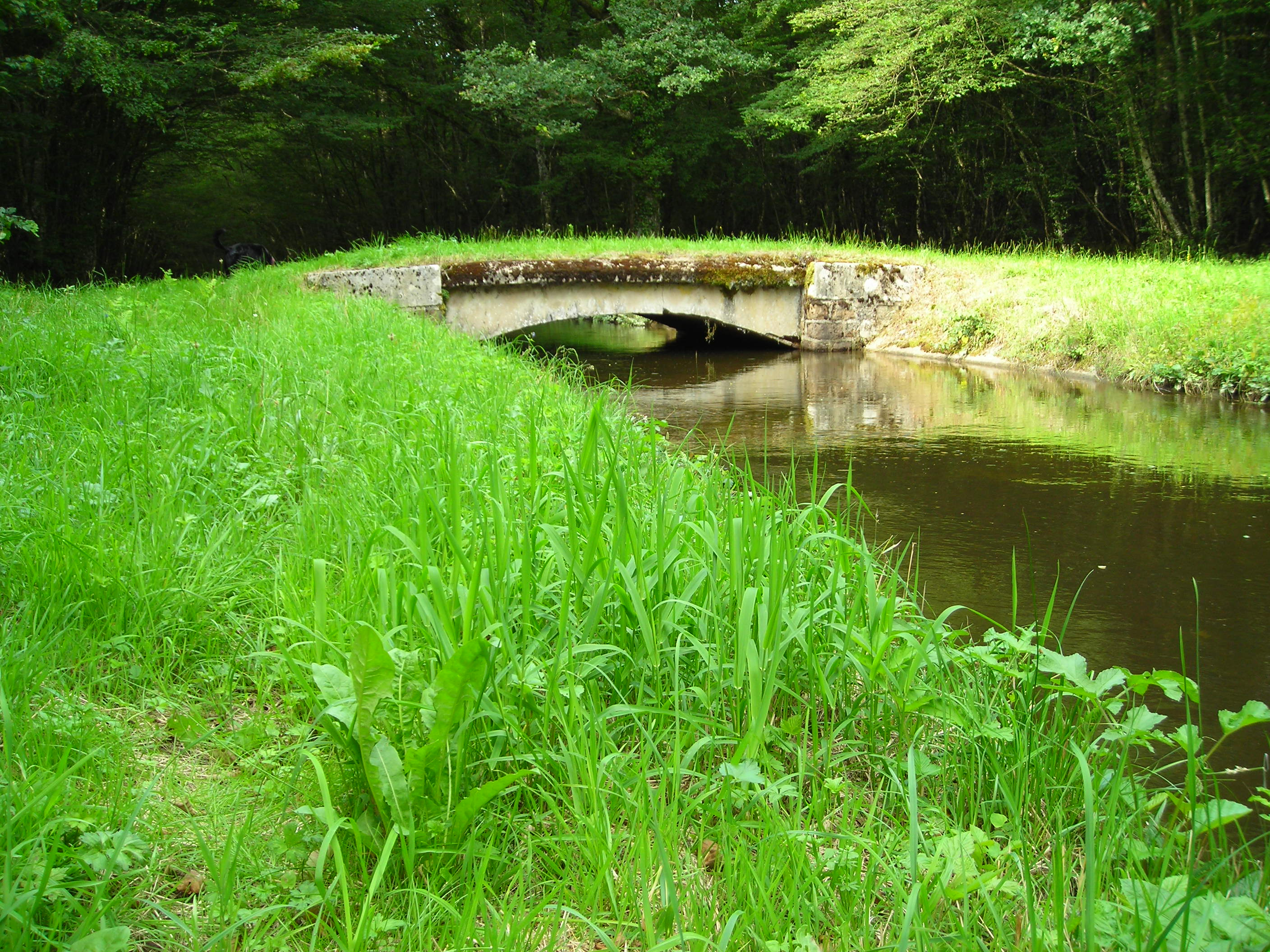 Pont de pierres sur la rigole d'Yonne à proximité du hameau "les quatre vents" sur la commune d'Epiry.